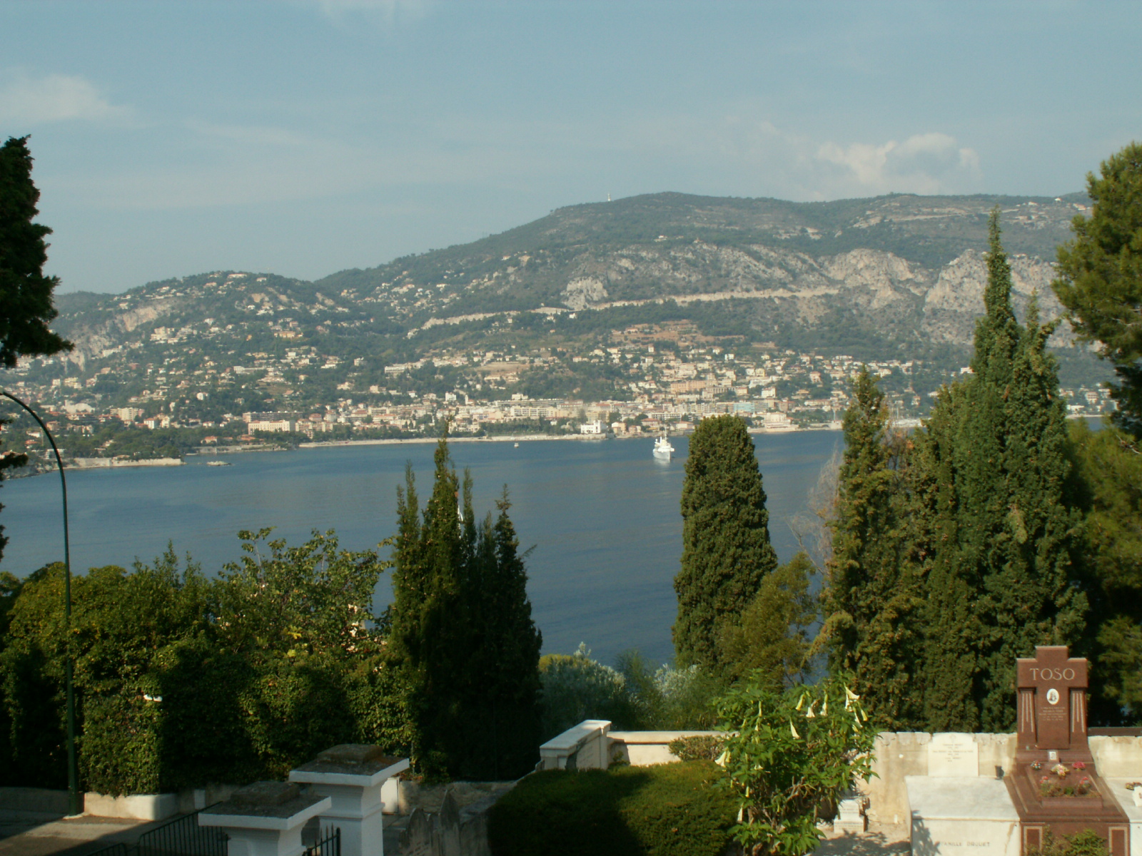 Beaulieu-sur-Mer from Saint-Hospice